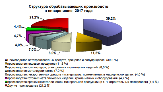 Предприятиями обрабатывающих производств в январе-июне 2017 года отгружено товаров, выполнено работ и услуг на 294,4 млрд. рублей.